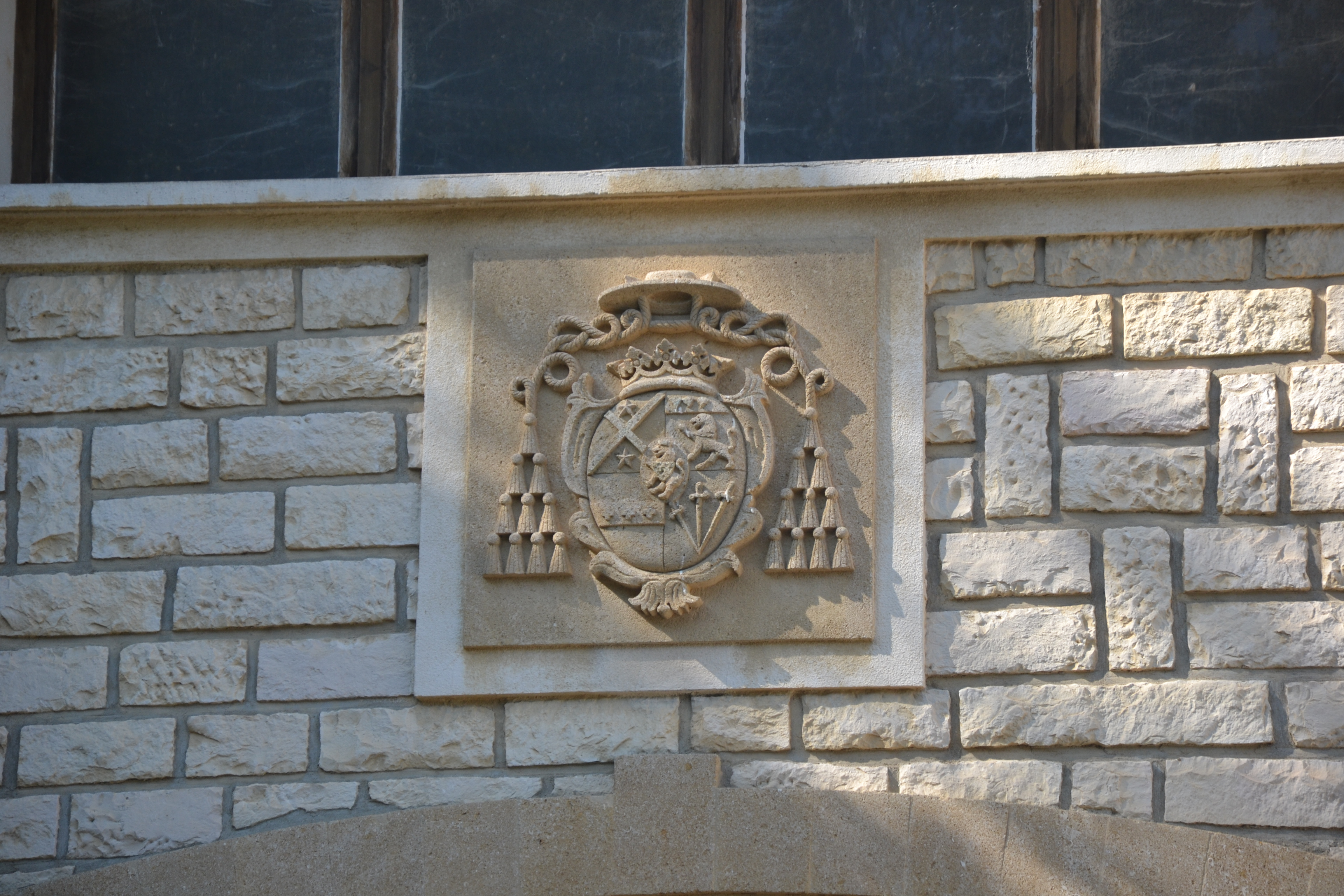 blason de cardinal